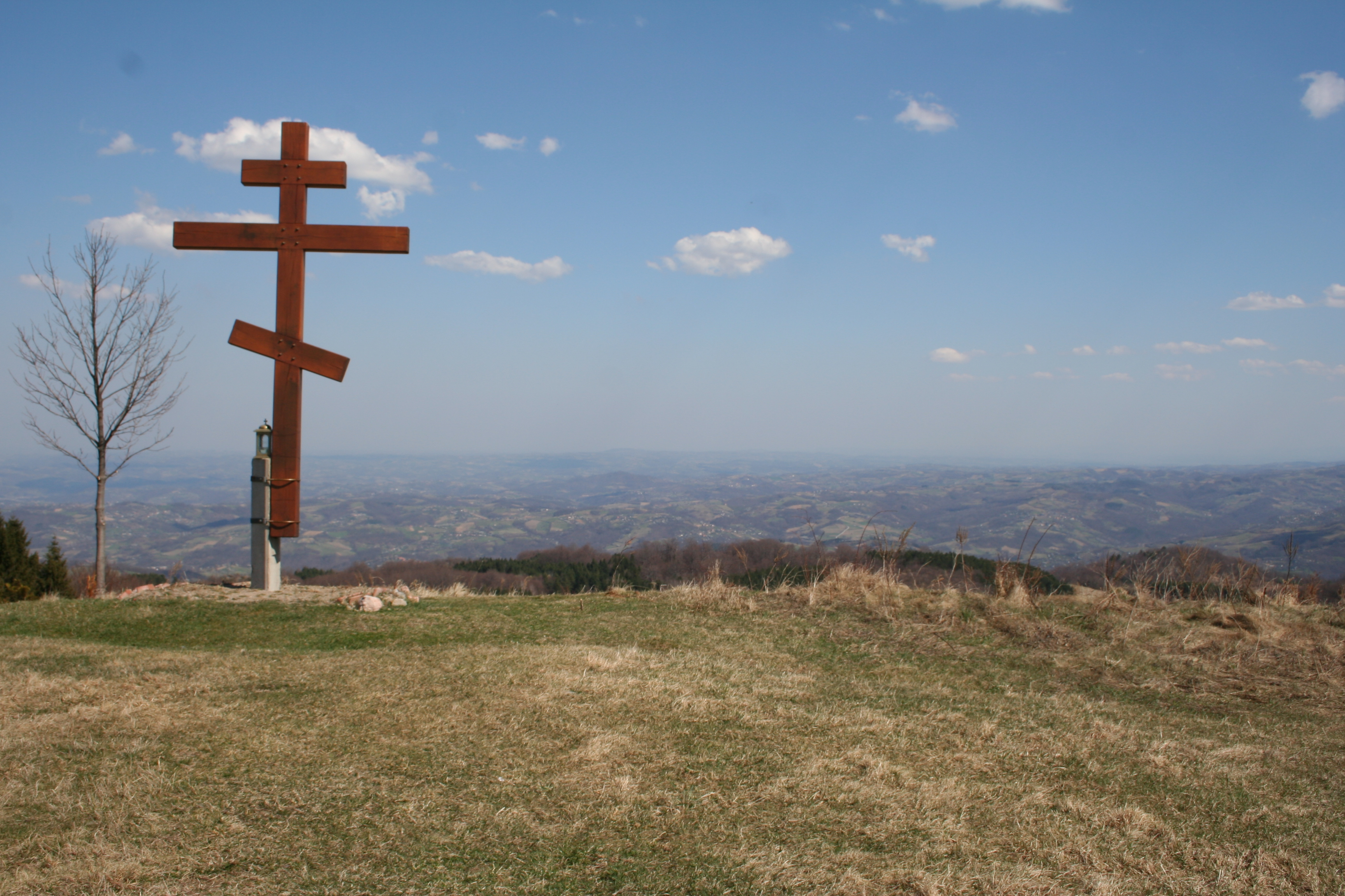 Vrh Rožanj, Sokolske planine